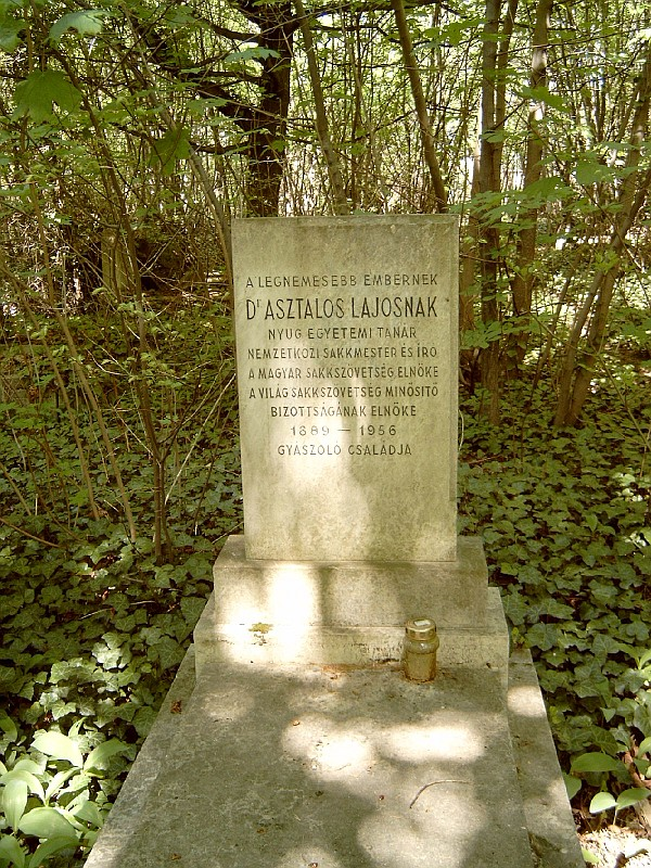 Asztalos Lajos sírja Budapesten. Kerepesi temető: 33/3-1-18.